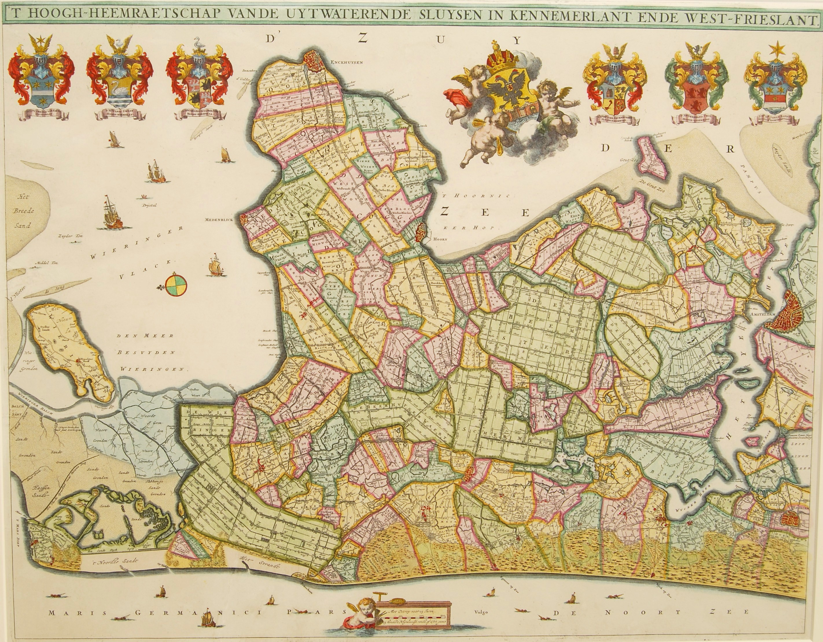 Kopergravure vervaardigd door Koenraet Decker naar het ontwerp van landmeter Johannes Dou, uitgegeven in 1745 door Isaac Tirion